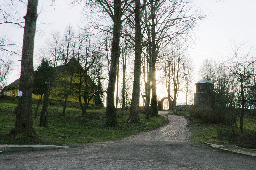 Dubingiai Church